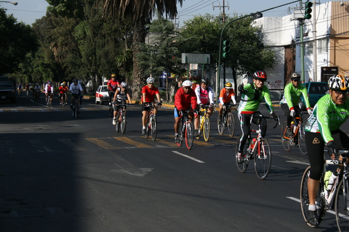 Grupo de cicloturismo en México